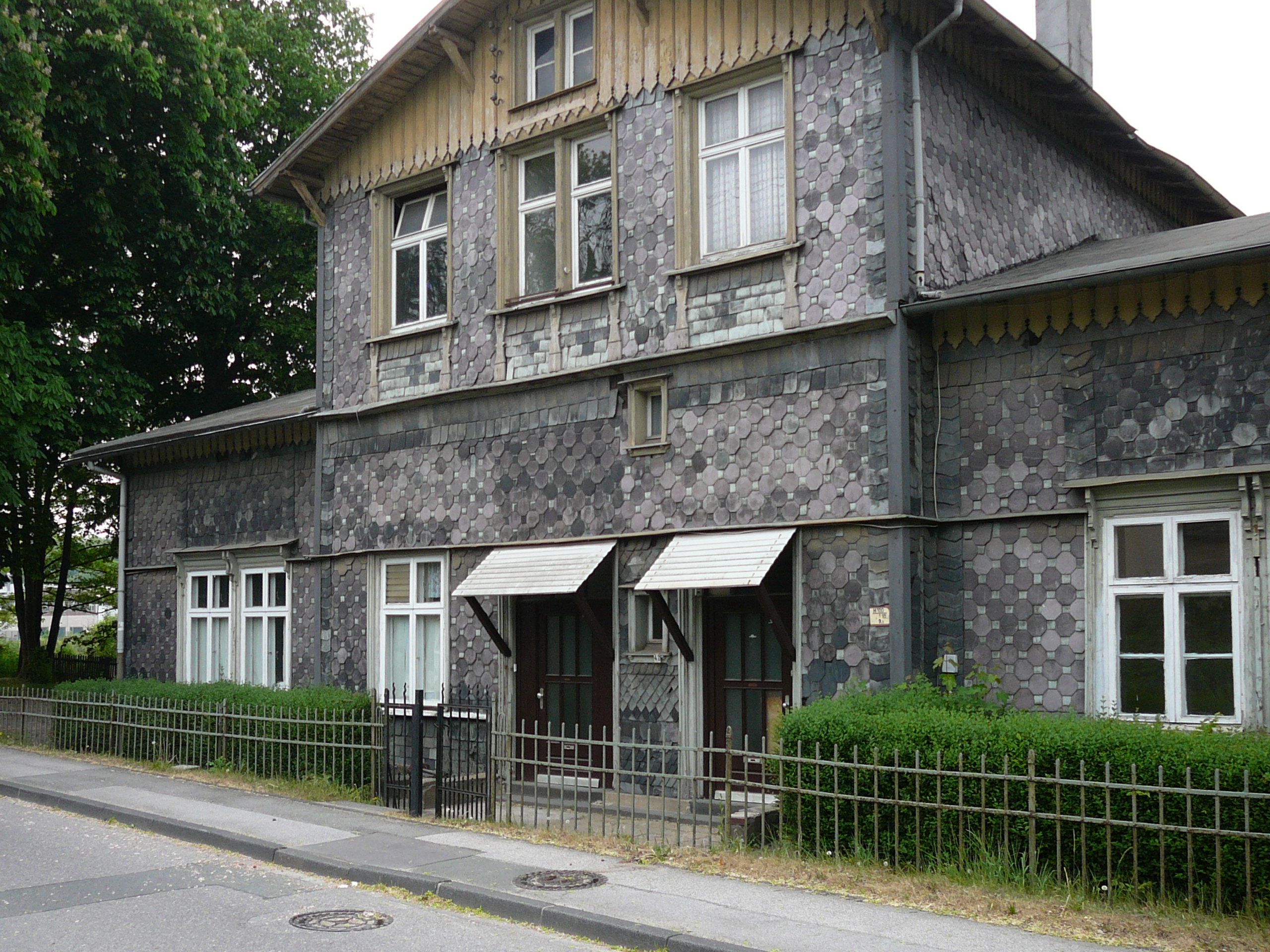 Historischer Bahnhof Wuppertal-Varresbeck